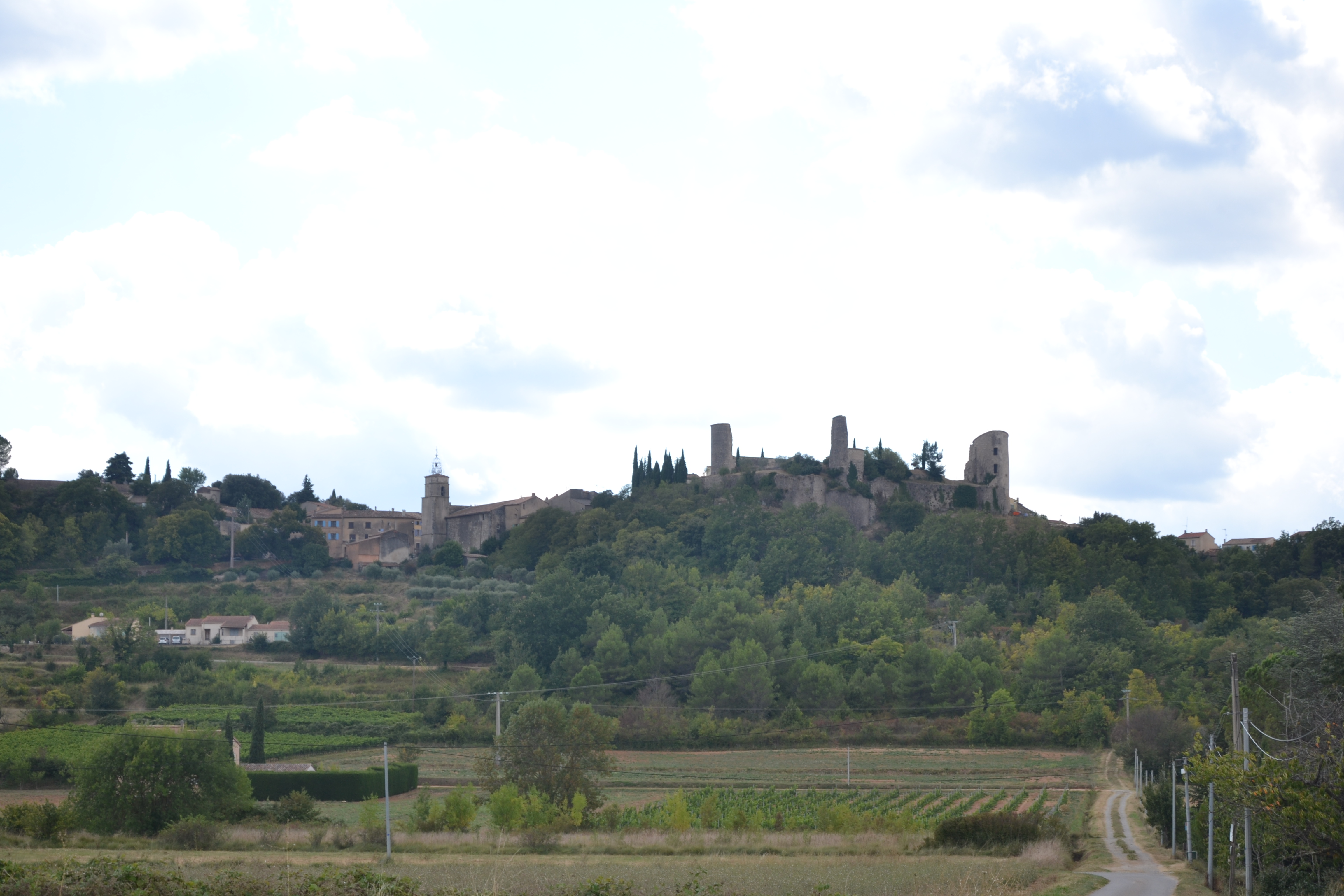 village de Pontevès